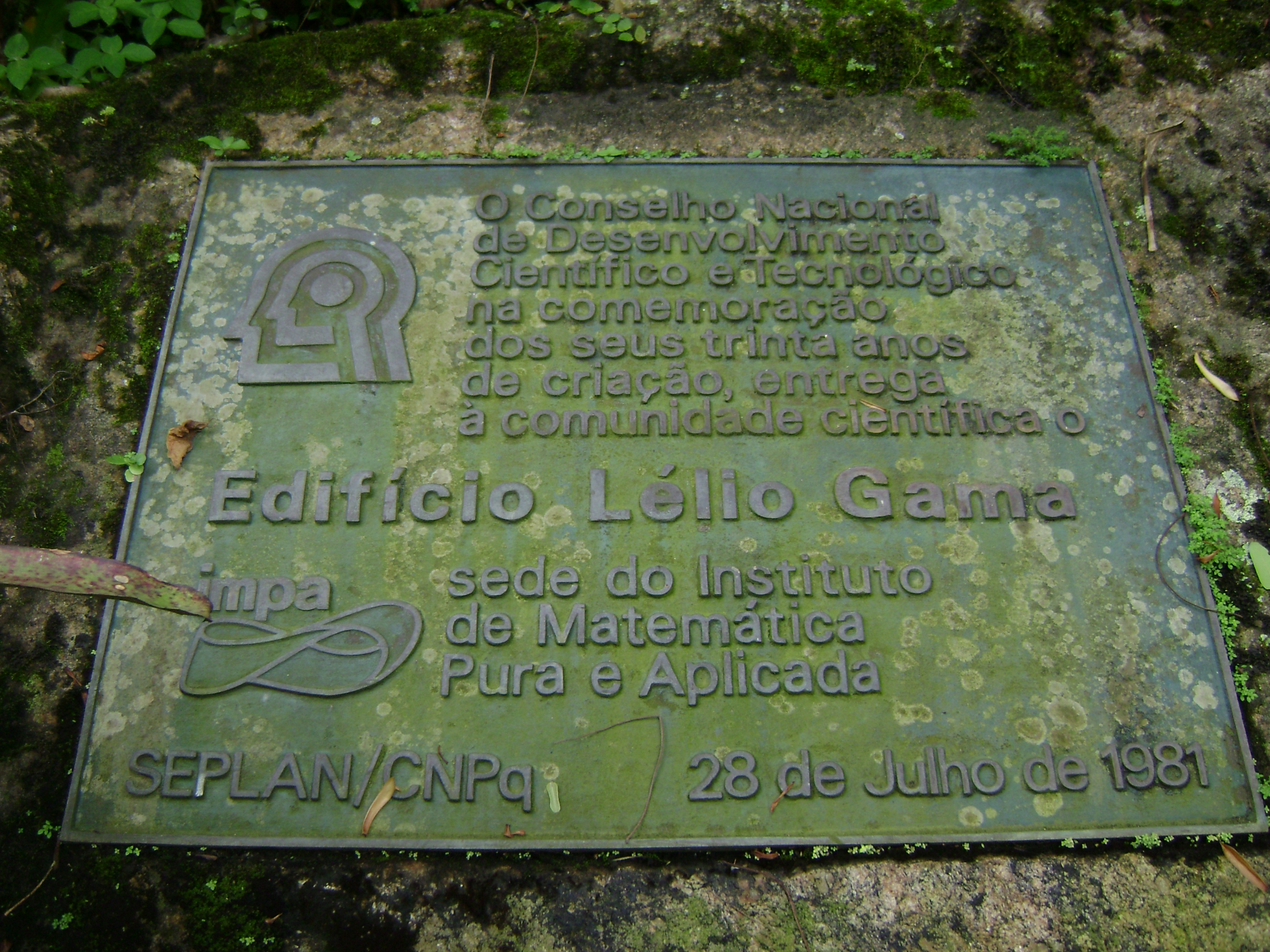 Inscrição na entrada do edifício Lélio Gama, na cidade do Rio de Janeiro, Brasil.